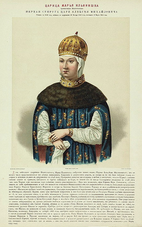 Maria Miłosławska